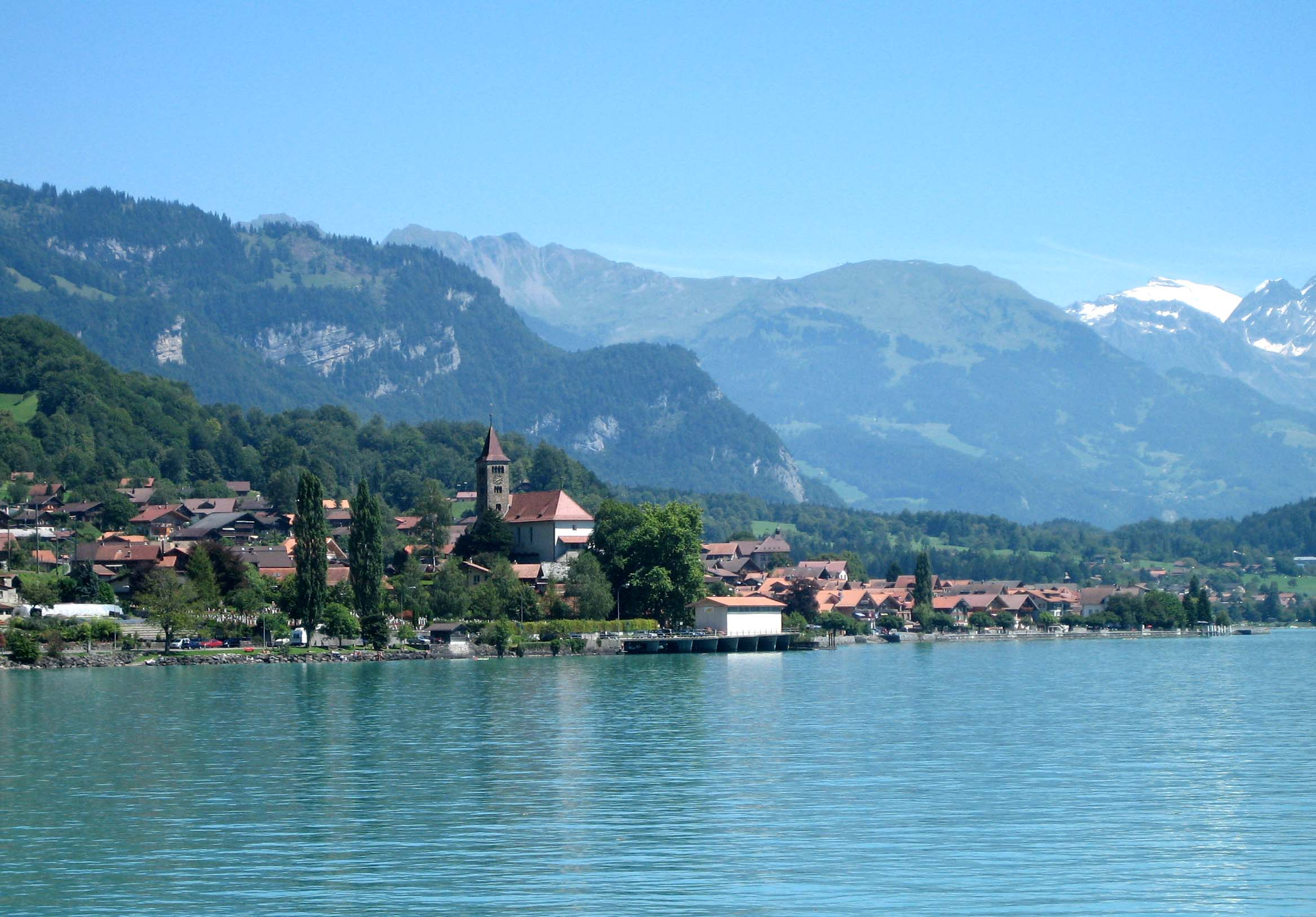 Brienz